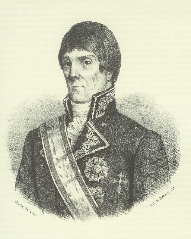 Retrato de Joseph Bustamante y Guerra. Caballero de Santiago y de Carlos III; cocapitaneó la Expedición Malaspina-Bustamante; Gobernador de Montevideo y Comandante Gral. de Río de la Plata y Capitán Gral. de Guatemala, Almirante, Vicepresidente de la Junta de Fomento.